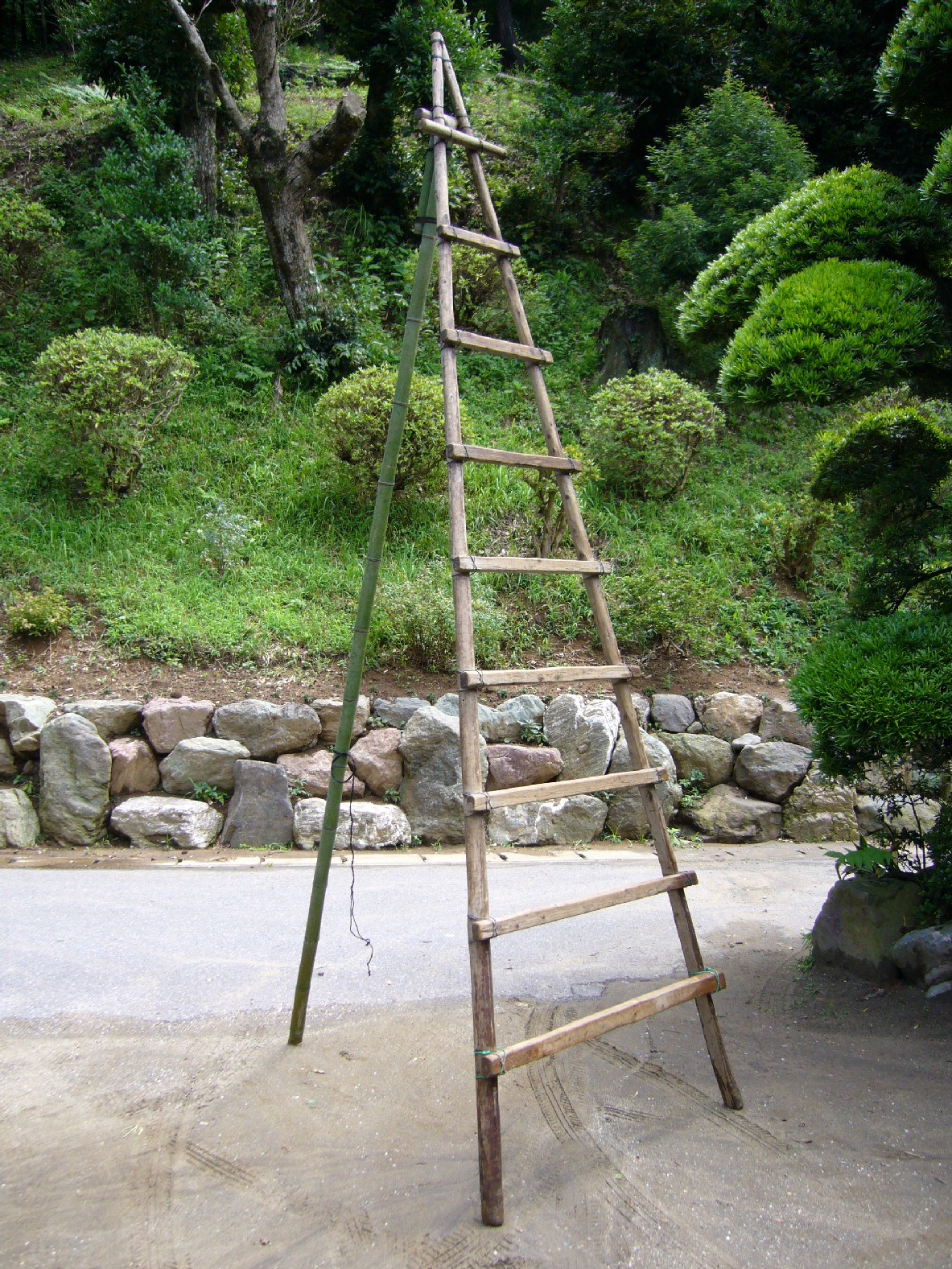 Stepladder-landscape-gardening,japan